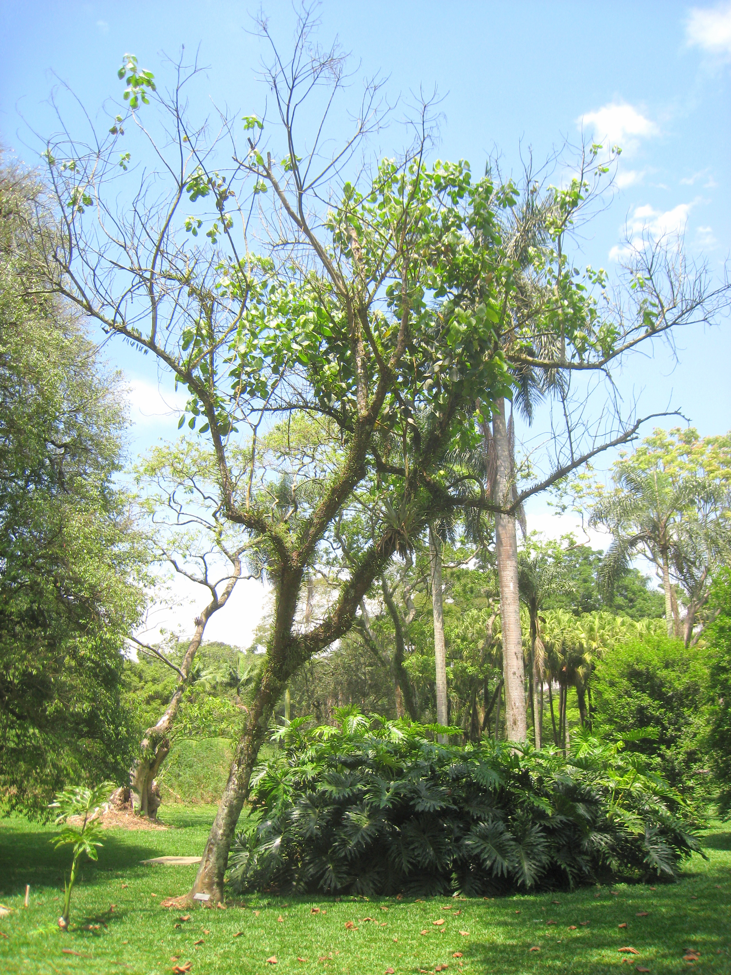 Alchornea iricurana in the Jardim Botânico de São Paulo, São Paulo City, SP, Brazil.